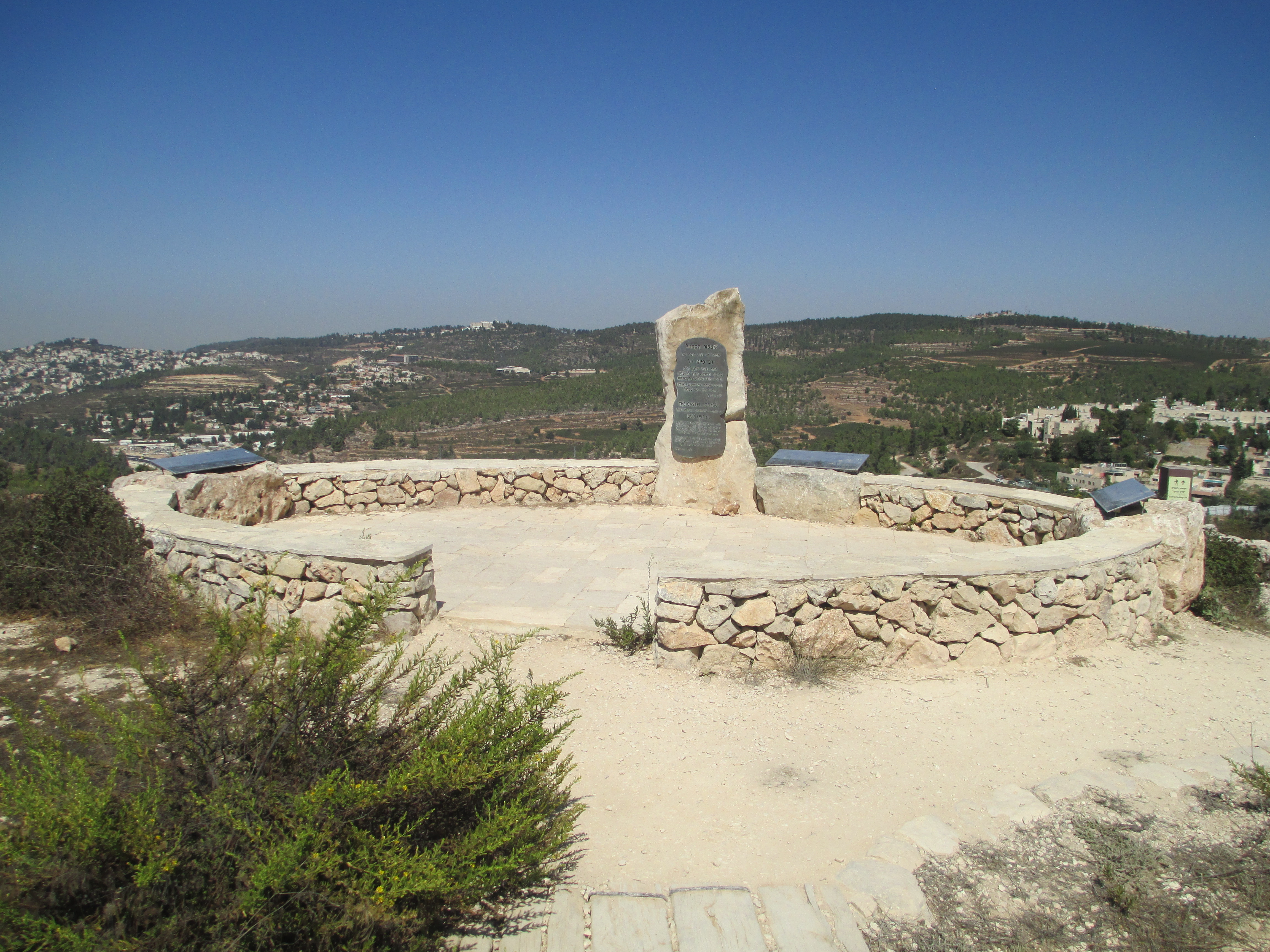 מצפור דב פייט בקסטל